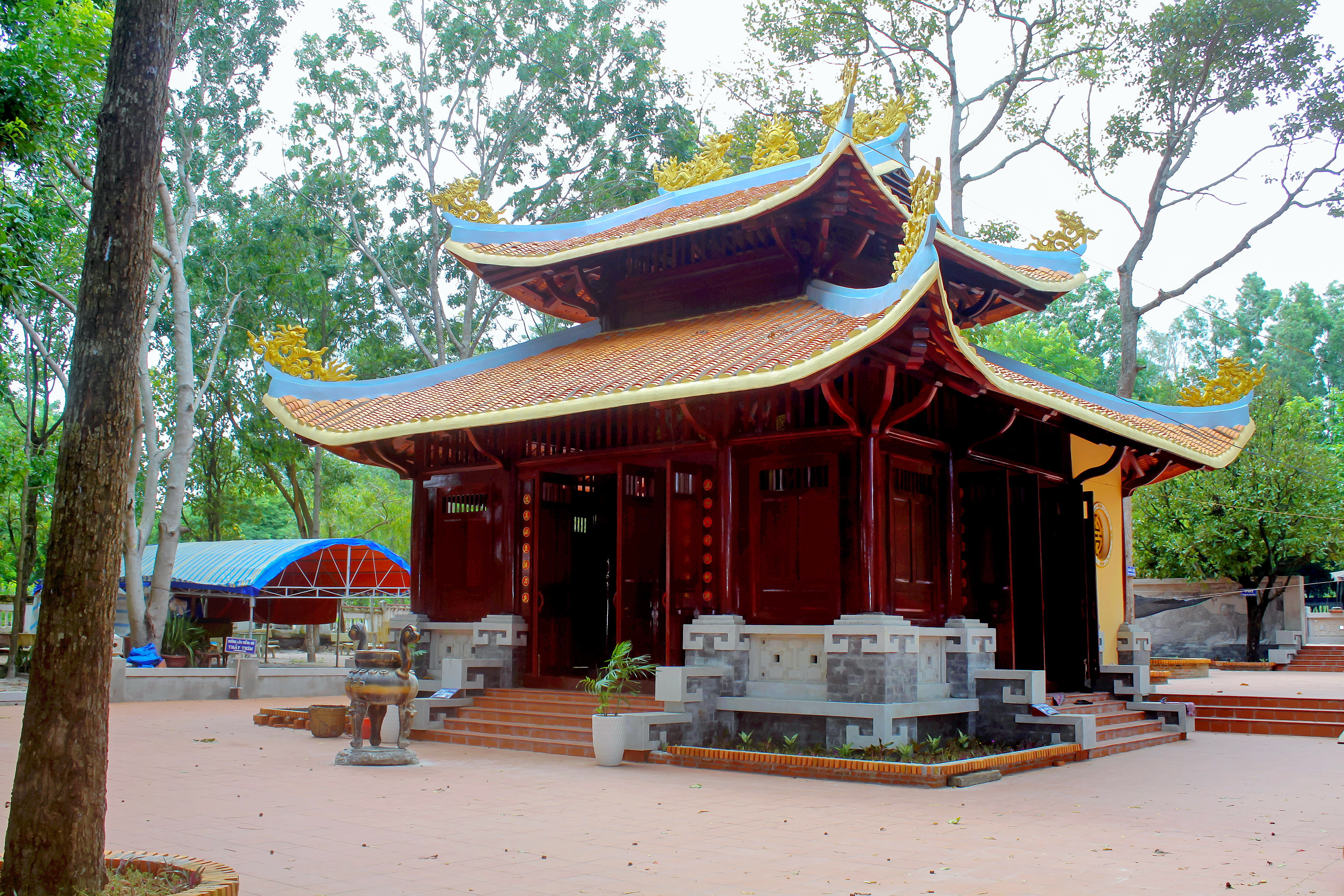 Đền thờ Thầy Thím ở tại khu mộ của ông, ở thị xã La Gi, tỉnh Bình Thuận, Việt Nam.